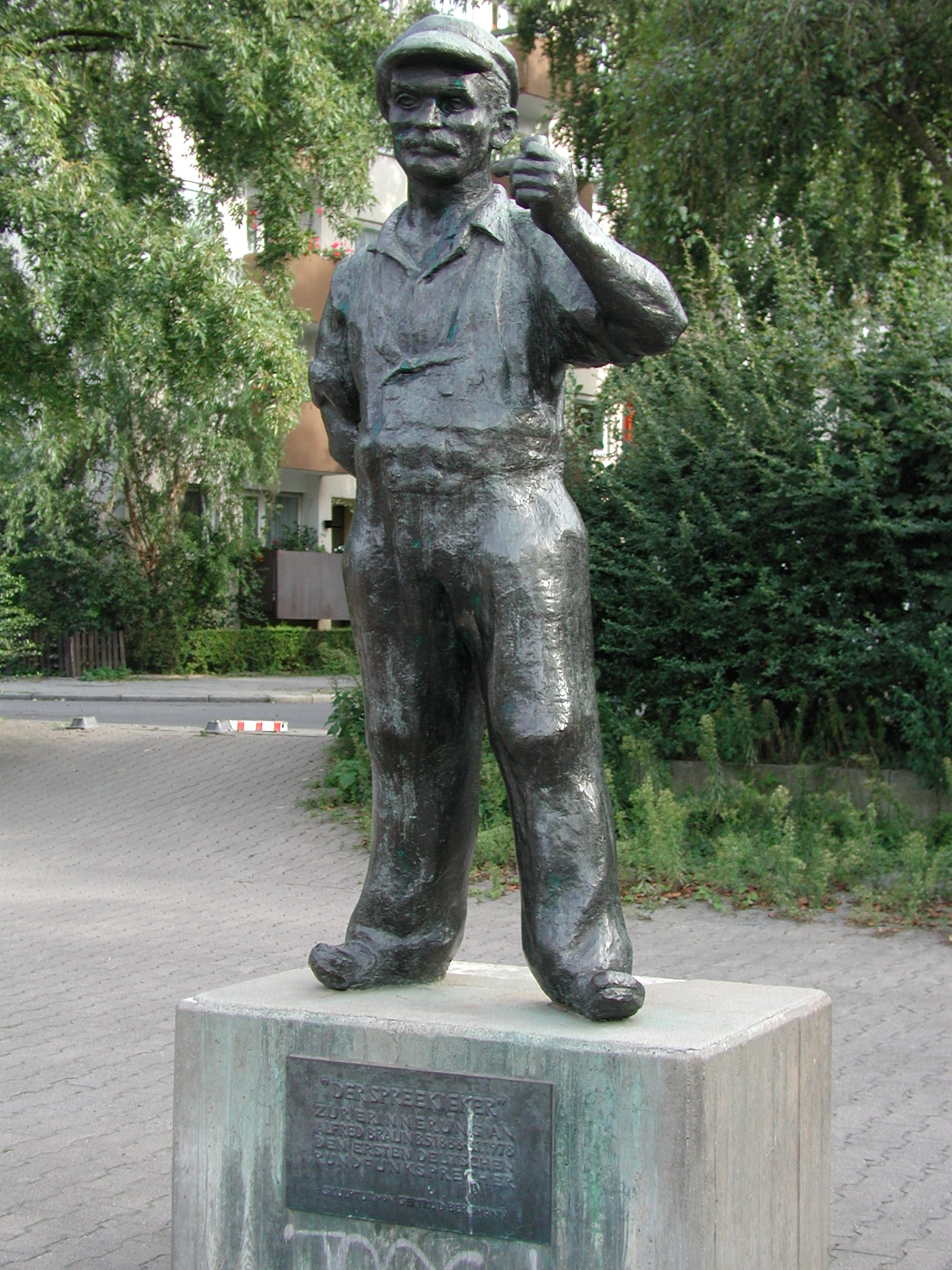 Denkmal für Alfred Braun in Berlin am Spreeufer